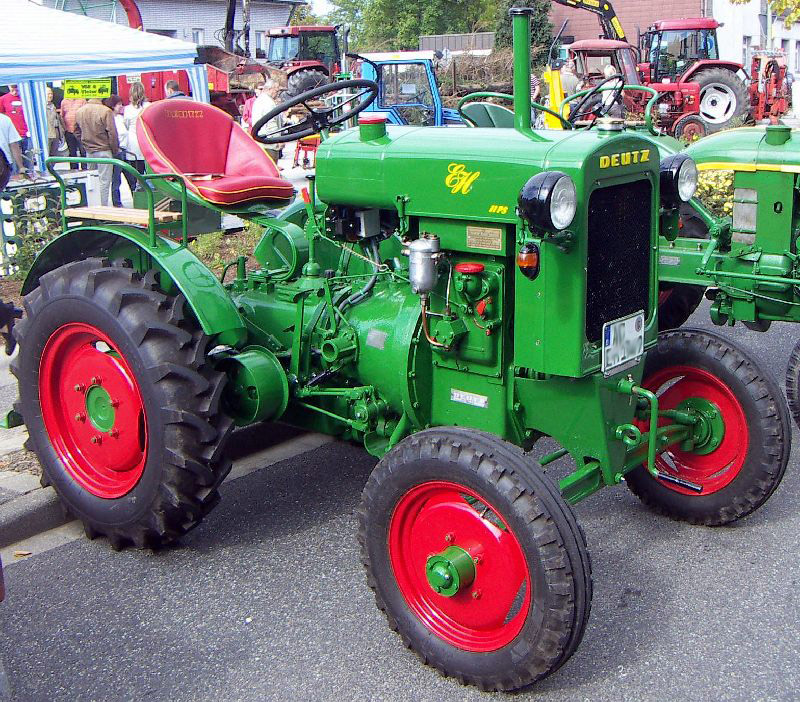 Deutz Elfer (F1M 414/46) mit 11 PS bei der Treckerparade beim Wirtschaftstag in Monschau-Imgenbroich (Eifel, Deutschland)